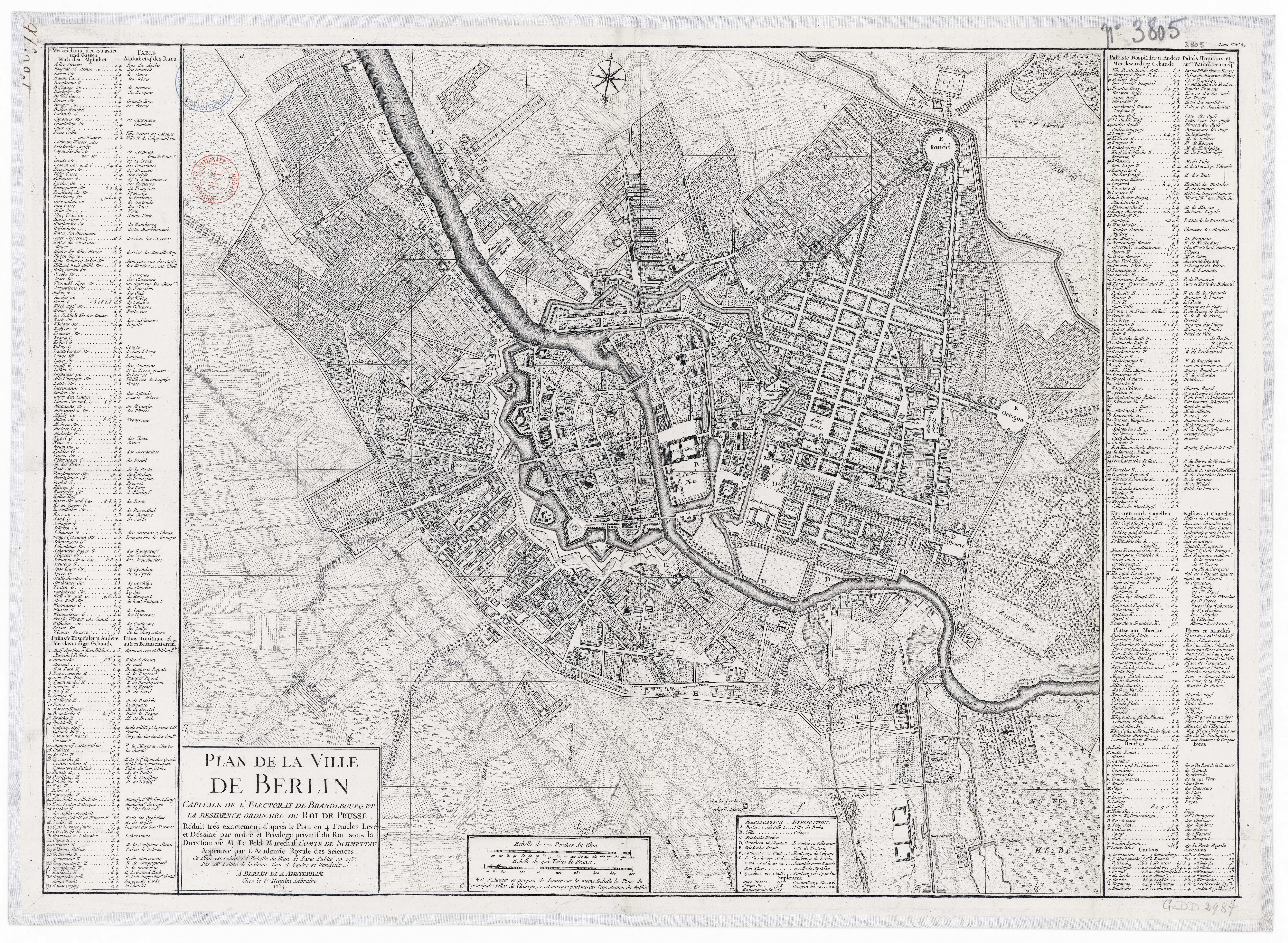 Plan de la Ville de BERLIN. Capitale de l'Electorat de Brandenbourg et la Residence ordinaire du Roi de Prusse. Réduit trés exactement d'apres le Plan en 4 Feuilles Levé et Dessiné par Ordre et Privilege privatif du Roi sous la Direction de M. Le Feld Maréchal Comte de Schmettau. Ce Plan est reduit a L'Echelle du Plan de Paris Publié en 1753. Par Mr. L'Abbé de la Grive. L'un et L'autre se Vendent A Berlin et a Amsterdam Chez le Sr. Néaulm Libraire 1757.